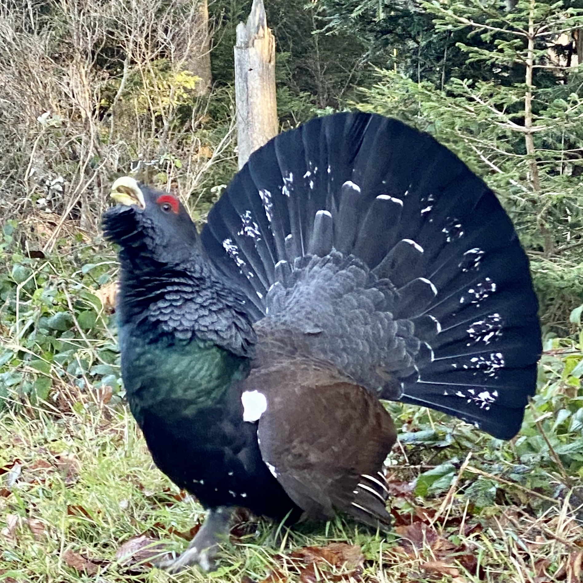 Wilder Auerhahn auf dem Hügelzug Höhronen. Obwohl die Tiere als selten und scheu gelten war dieses Exemplar recht aufdringlich und lief und flatterte Wanderern nach. Die Aufnahme gelang Ende Noveber, weit ausserhalb der Brut- oder Balzzeit.